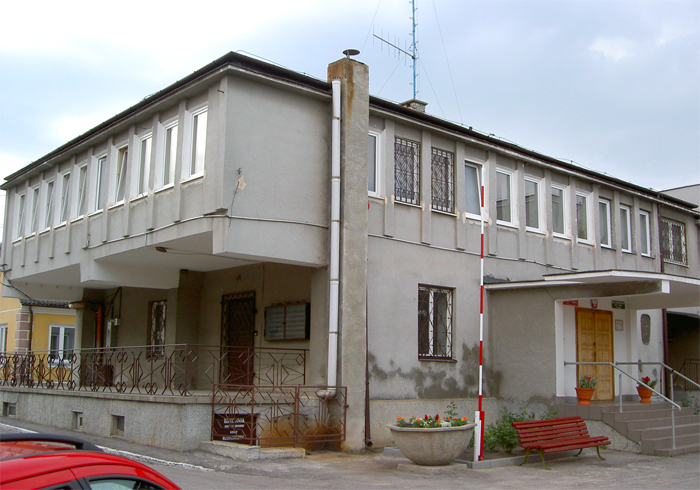 Goraj, Poland • Urząd Gminy / Commune Council